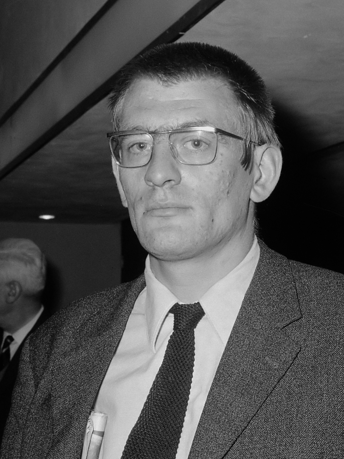 Uitreiking aan een aantal kunstenaars van de oorkonde behorende bij de door de Gemeente Amsterdam in 1963 en 1964 toegekende prijzen op het gebied van de kunst in de David Roëllzaal van het Rijksmuseum te Amsterdam. J. Bernlef (Hendrik Jan Marsman) 15 oktober 1965